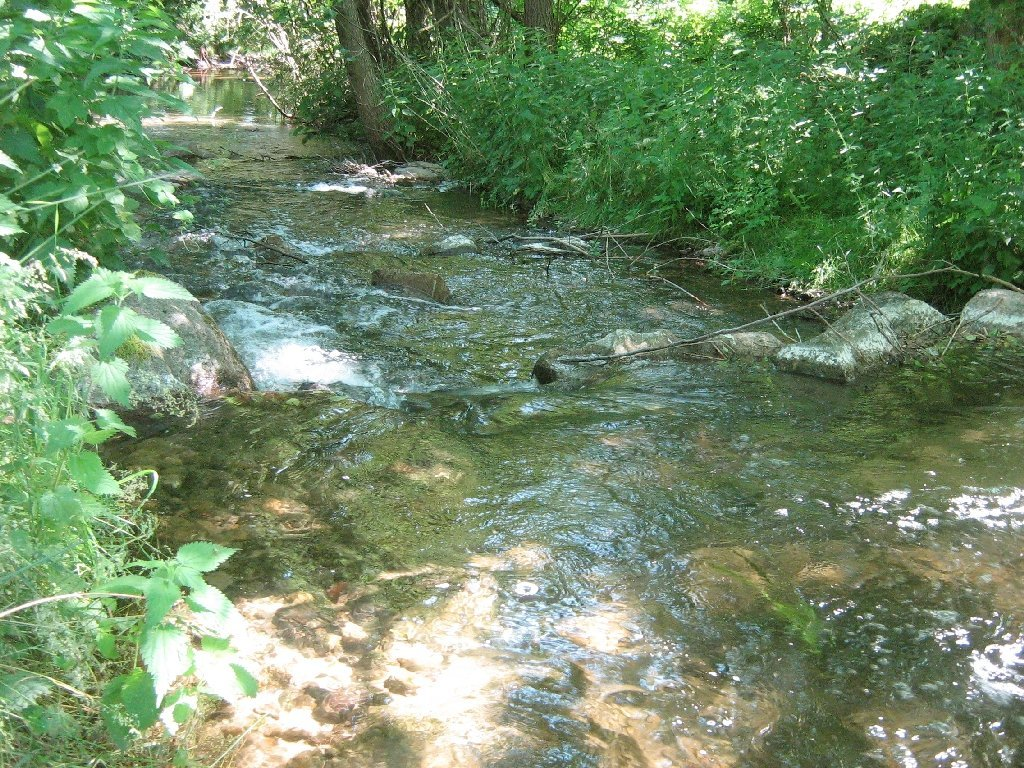 Die Havel zwischen Granziner- und Pagelsee in der Mecklenburgische Seenplatte (Landkreis Mecklenburg-Strelitz).